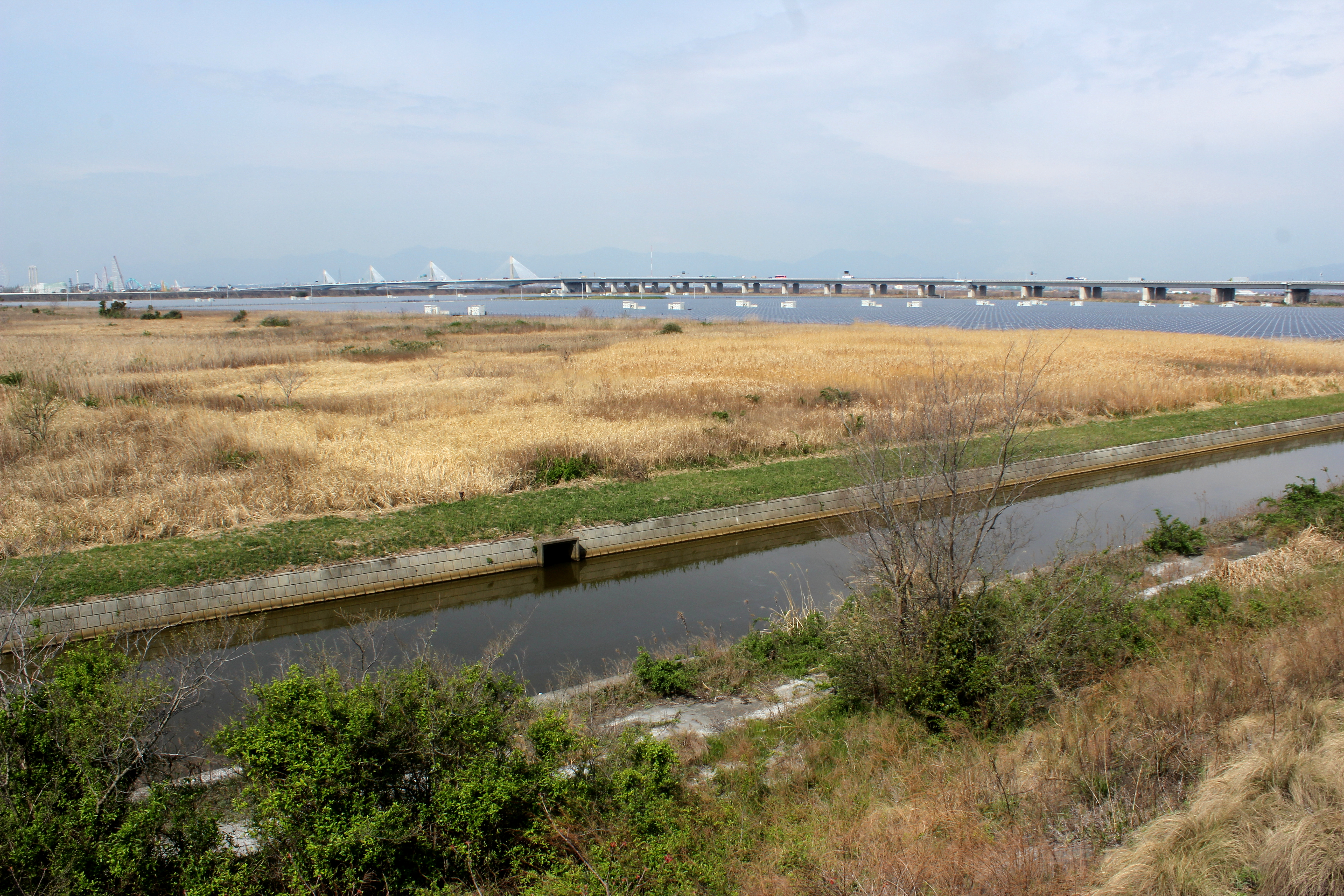 木曽岬干拓地付近の伊勢湾岸自動車道